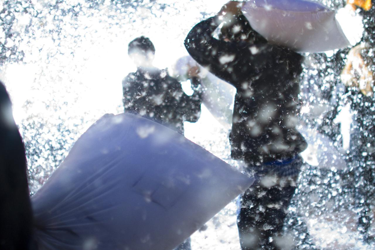 PILLOW FIGHT